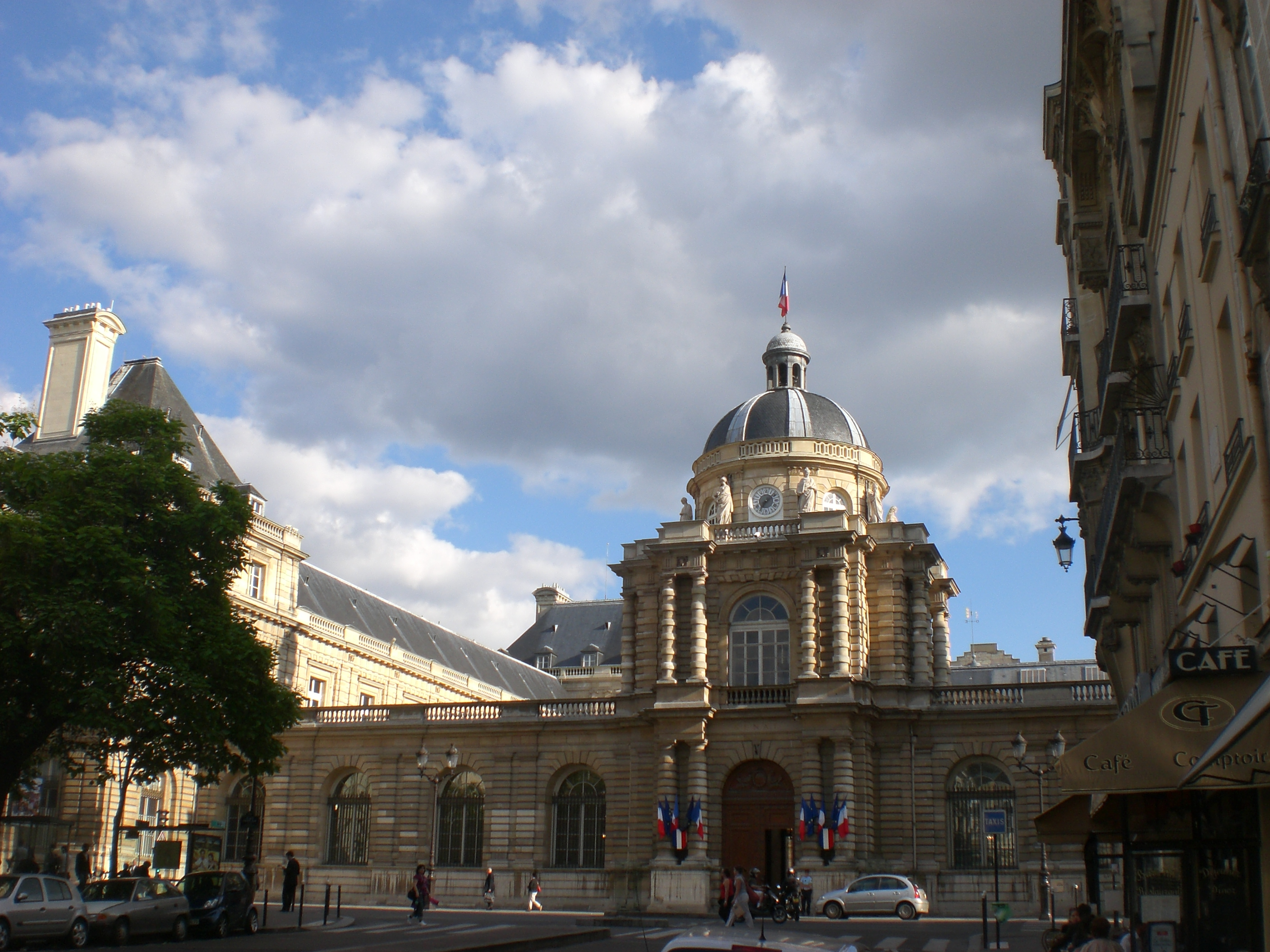 Paris, palais du Luxembourg, Façade vers la ville